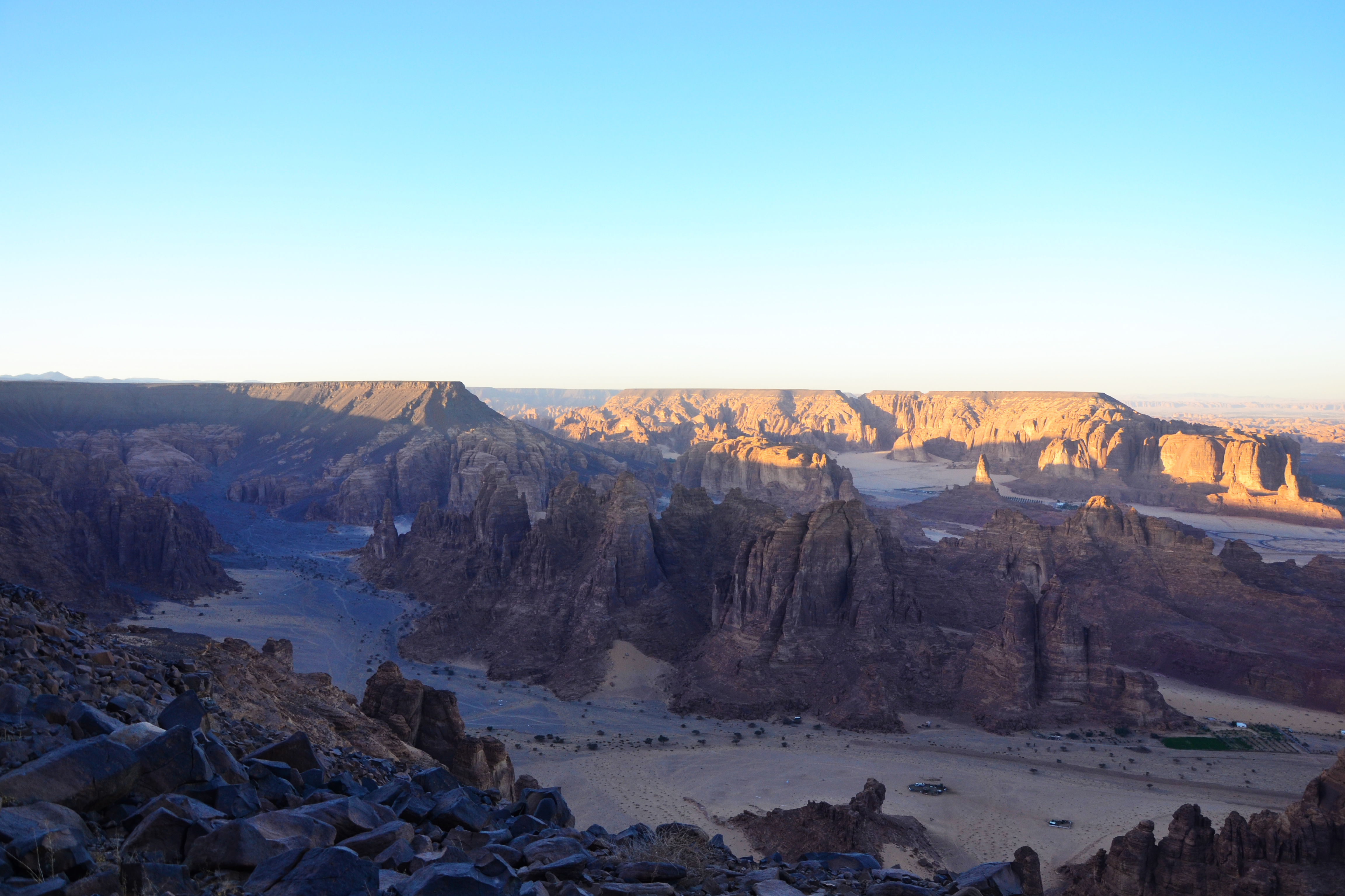 Al Ula